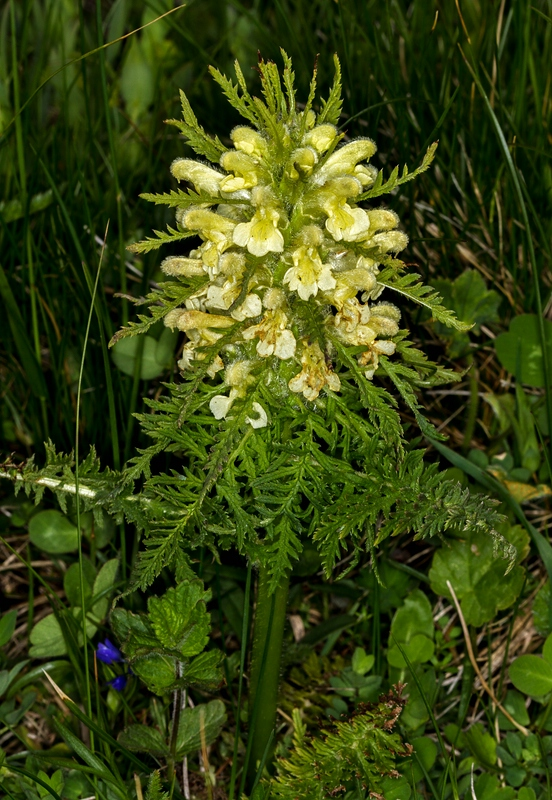 an der Großglockner Hochalpenstraße (ca. 1900 m ü.M.): Beblättertes Läusekraut